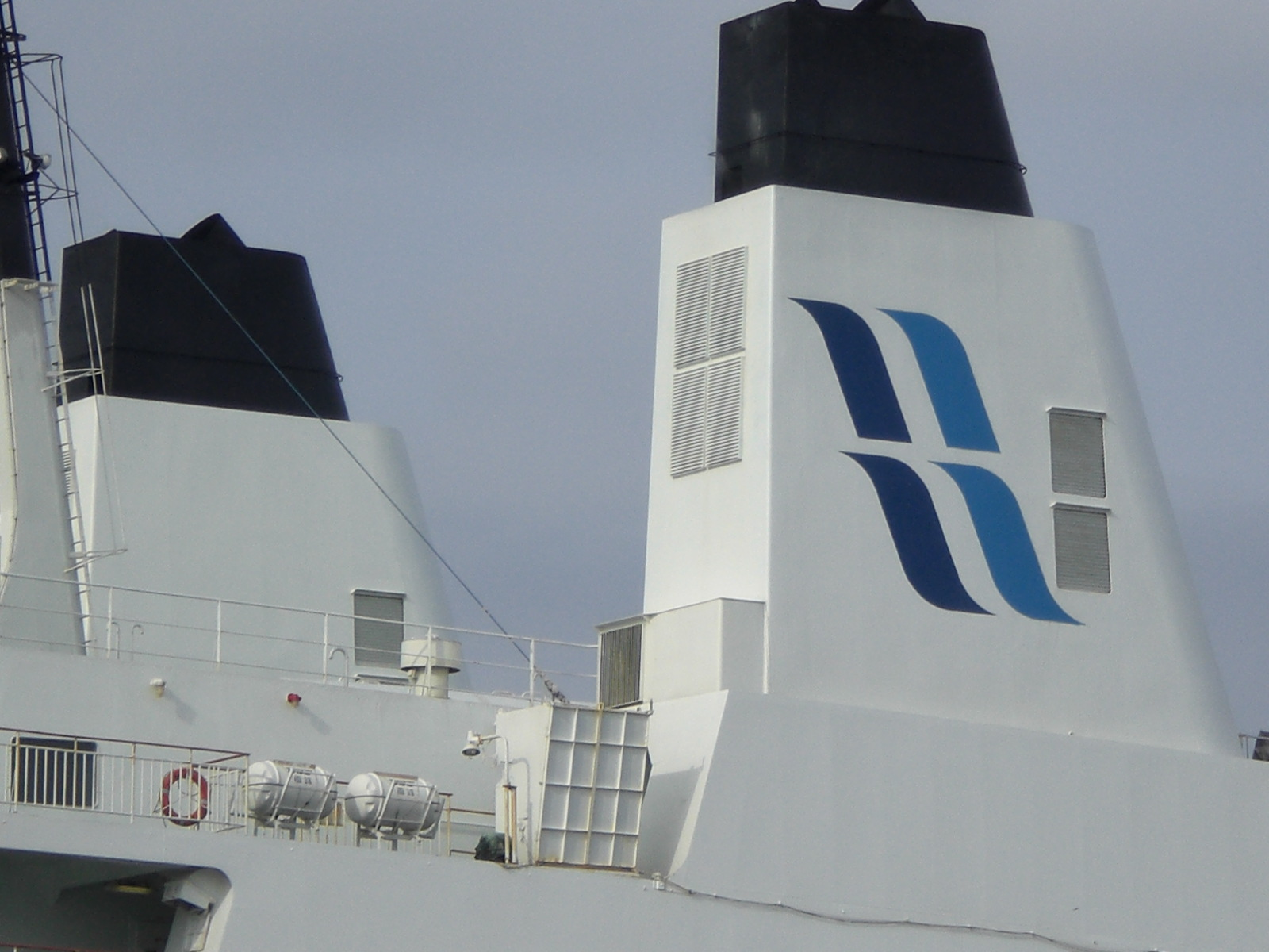 東日本フェリー「びるご」のファンネルマーク